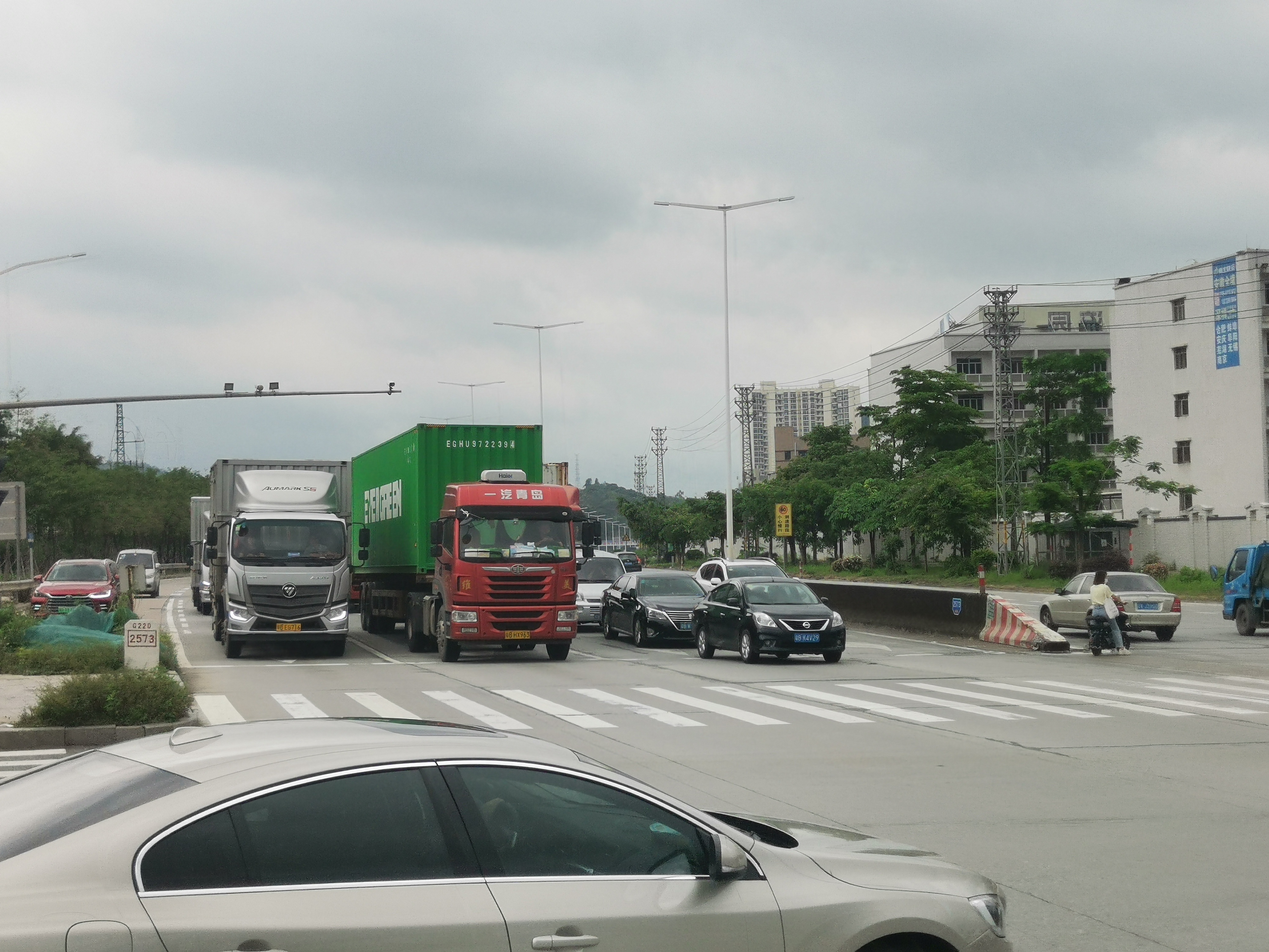 东莞凤岗镇东深路祥新路口，220国道2573公里处